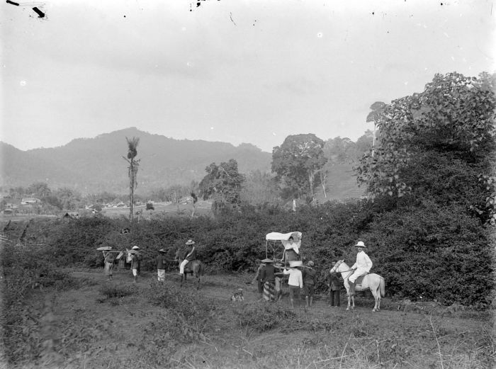 Negatief. Verhuizing in de binnenlanden, Regentschap Preanger, Soemedang